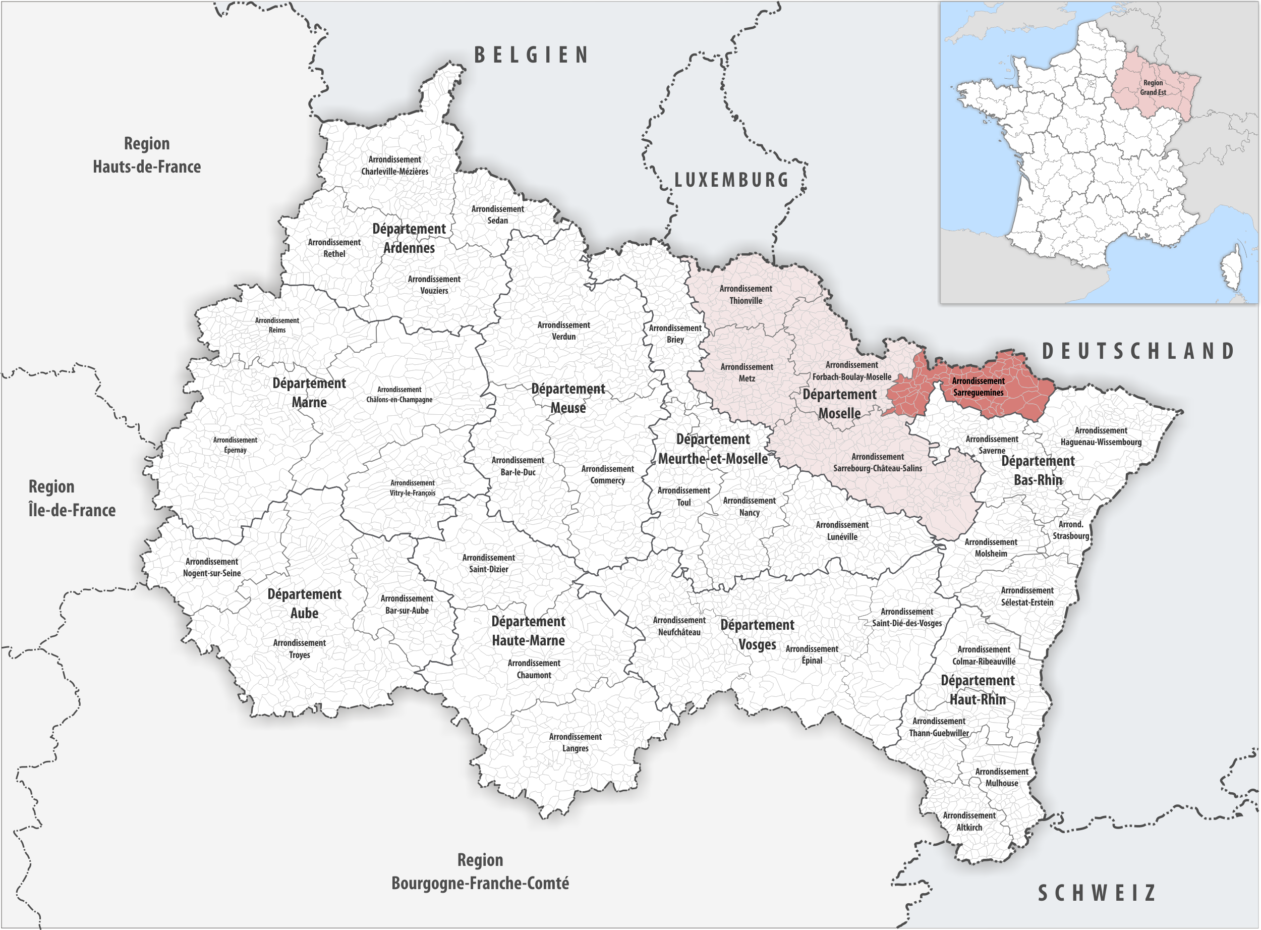 Lage des Arrondissements Sarreguemines